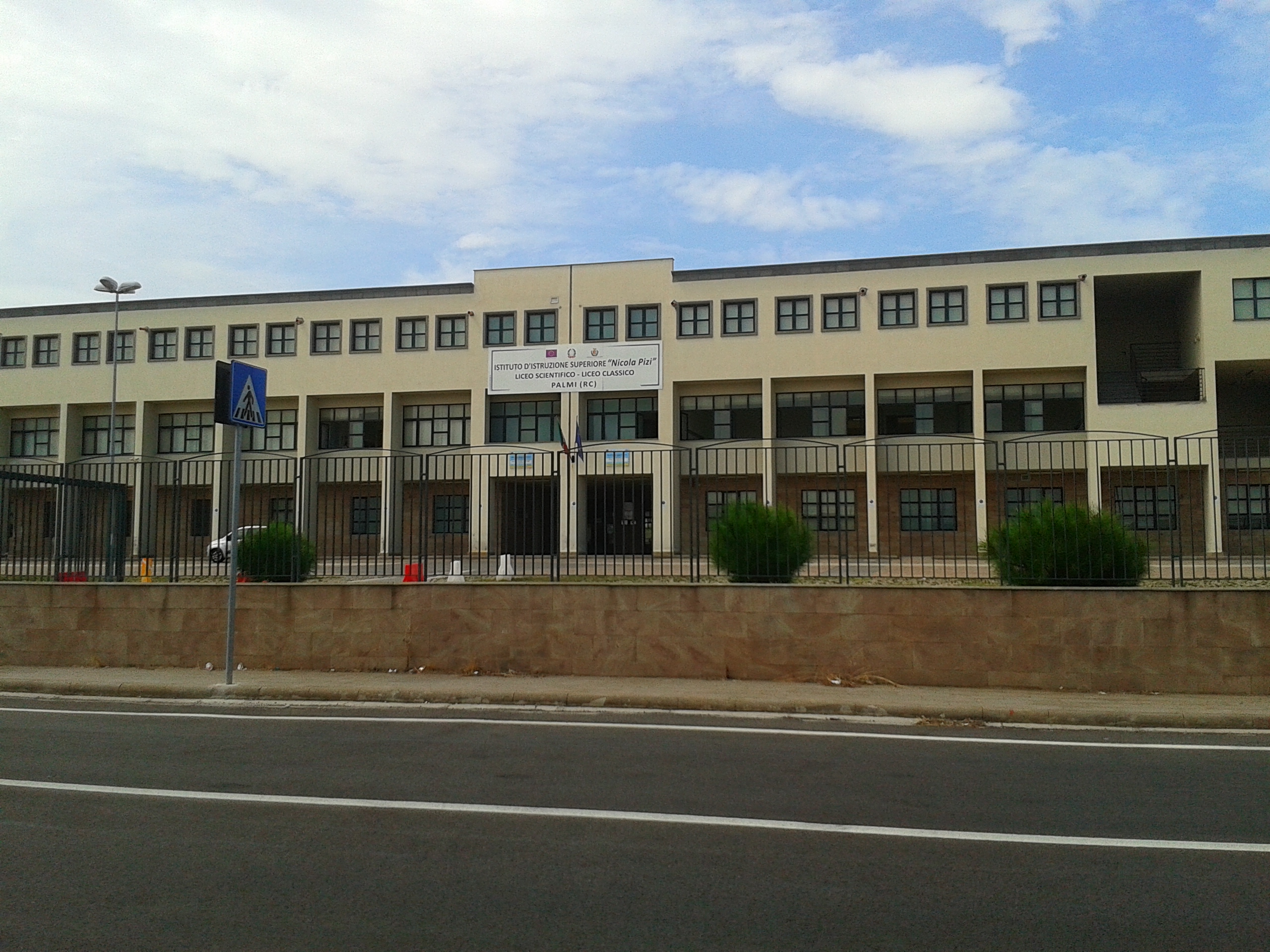 Edificio ospitante il Liceo Scientifico di Palmi, facente parte dell'Istituto d'Istruzione Superiore "Nicola Pizi".